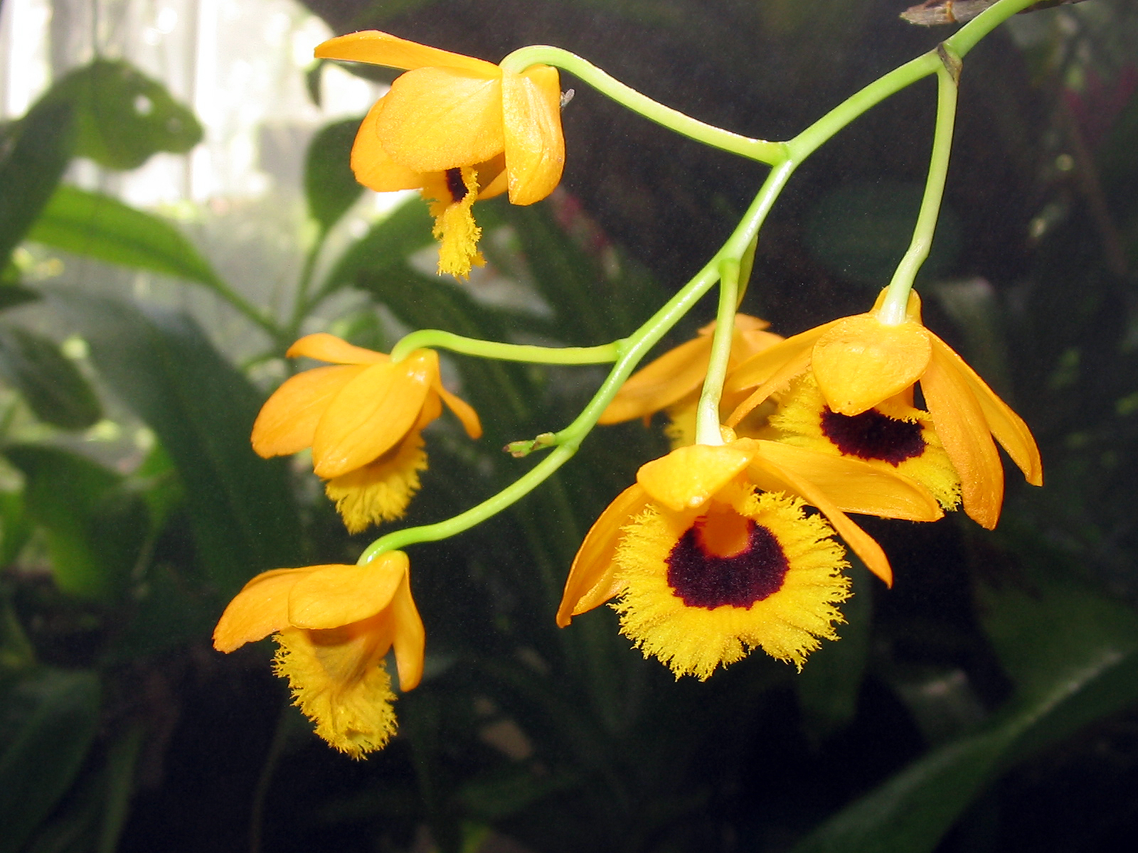 Dendrobium fimbriatum Pablo Alberto Salguero Quiles